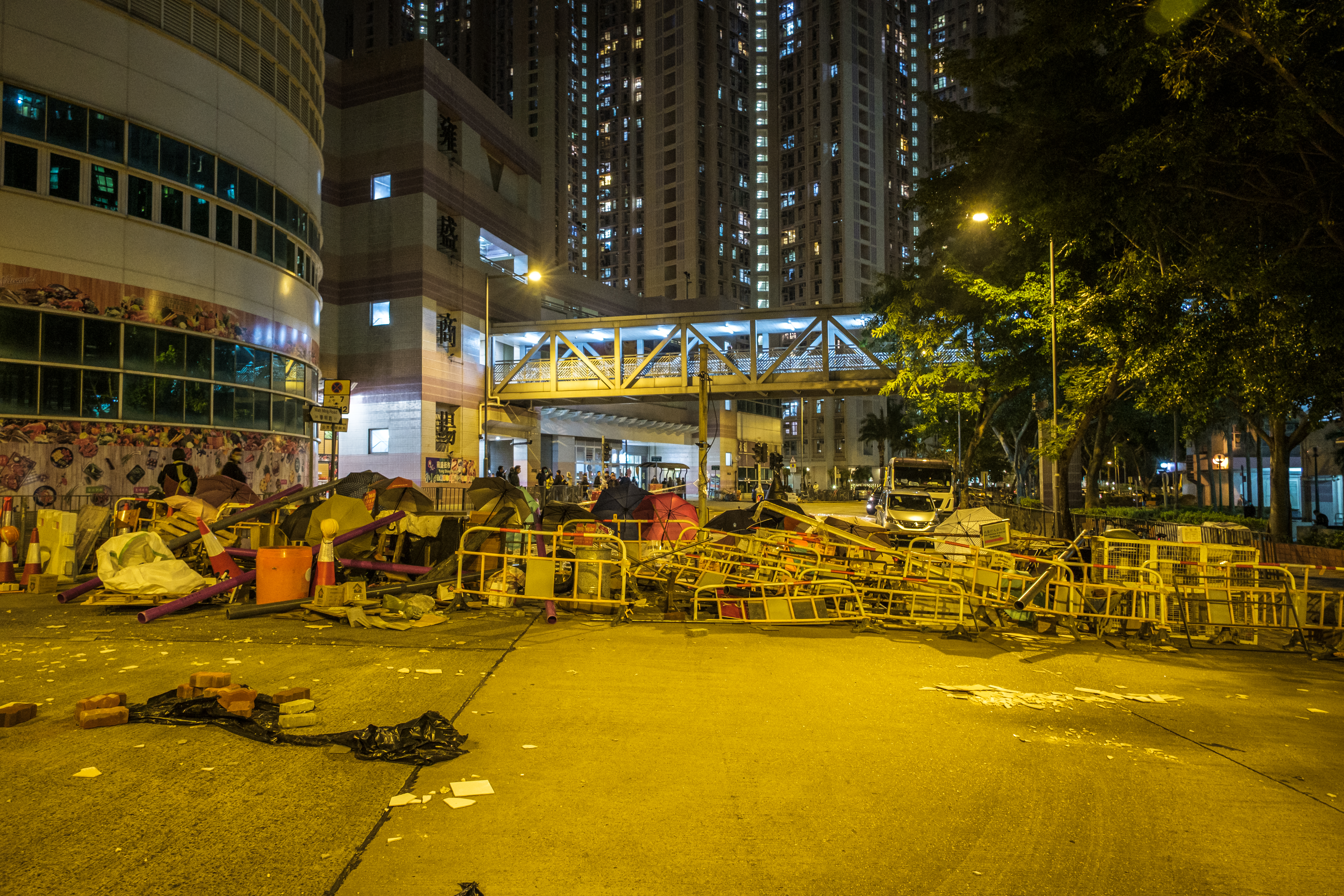 粉嶺有人不滿政府擬將未入伙的暉明邨用作隔離新型冠狀病毒患者的密切接觸者，下午起在附近一帶堵路，晚上更有人在暉明邨兩座大廈縱火，大批防暴警察到場驅趕。政府表示 ，在周三北區區議會進行討論前，將暫停相關準備工作。 Studio Incendo